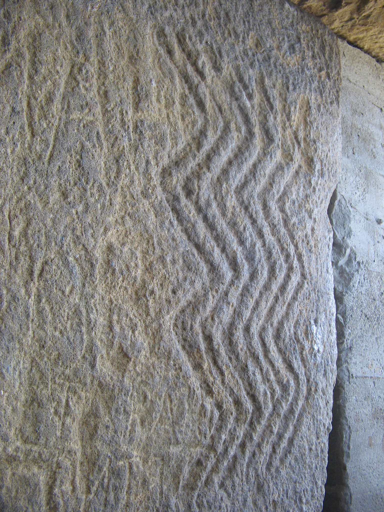 Перечень узоров на дольменах Кавказа очень лаконичен, к одному из немногих относится знак "воды". Ориентация снимка - соблюдена. Голубоватый блок справа - бетон, установлен при реставрации. Составной дольмен г. Нексис, Геленджикский р-н Краснодарского Края.